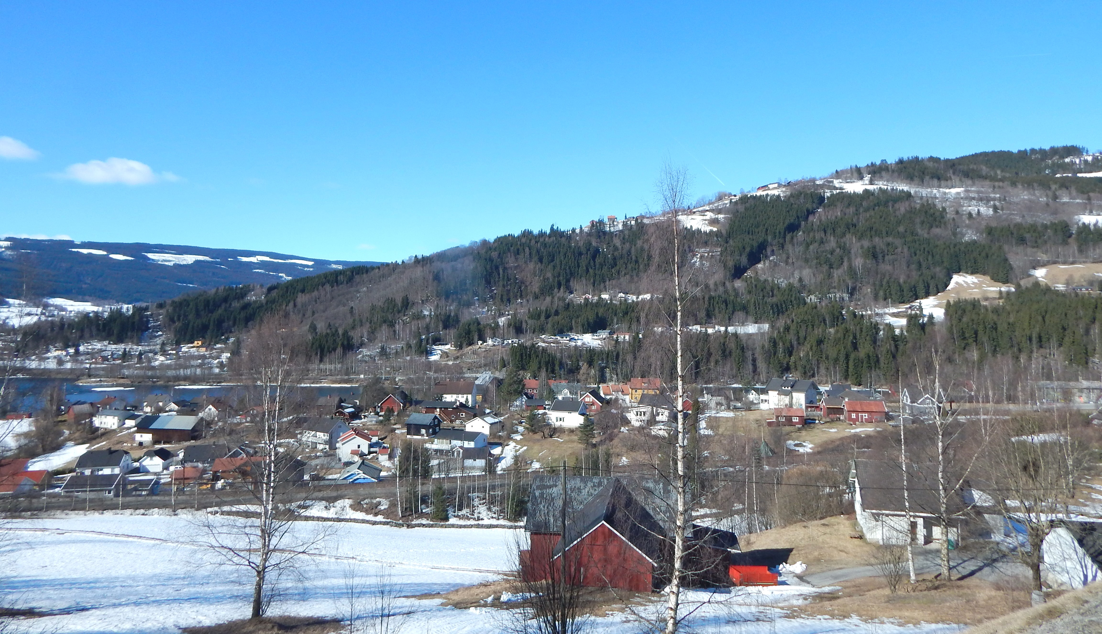 Utsikt over tettstedet Fåberg